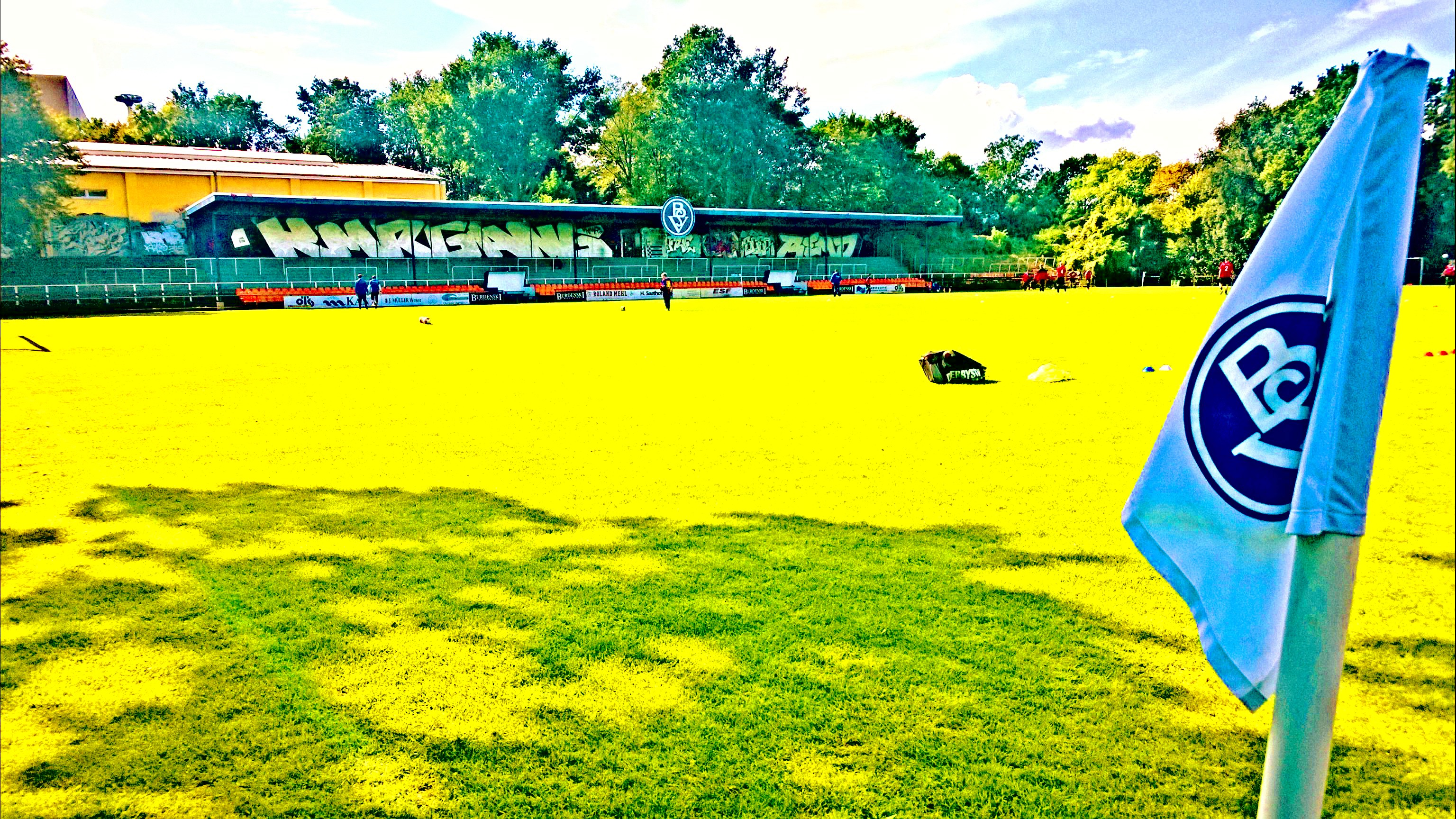 Das Stadion am Panzenberg im Sommer 2015.